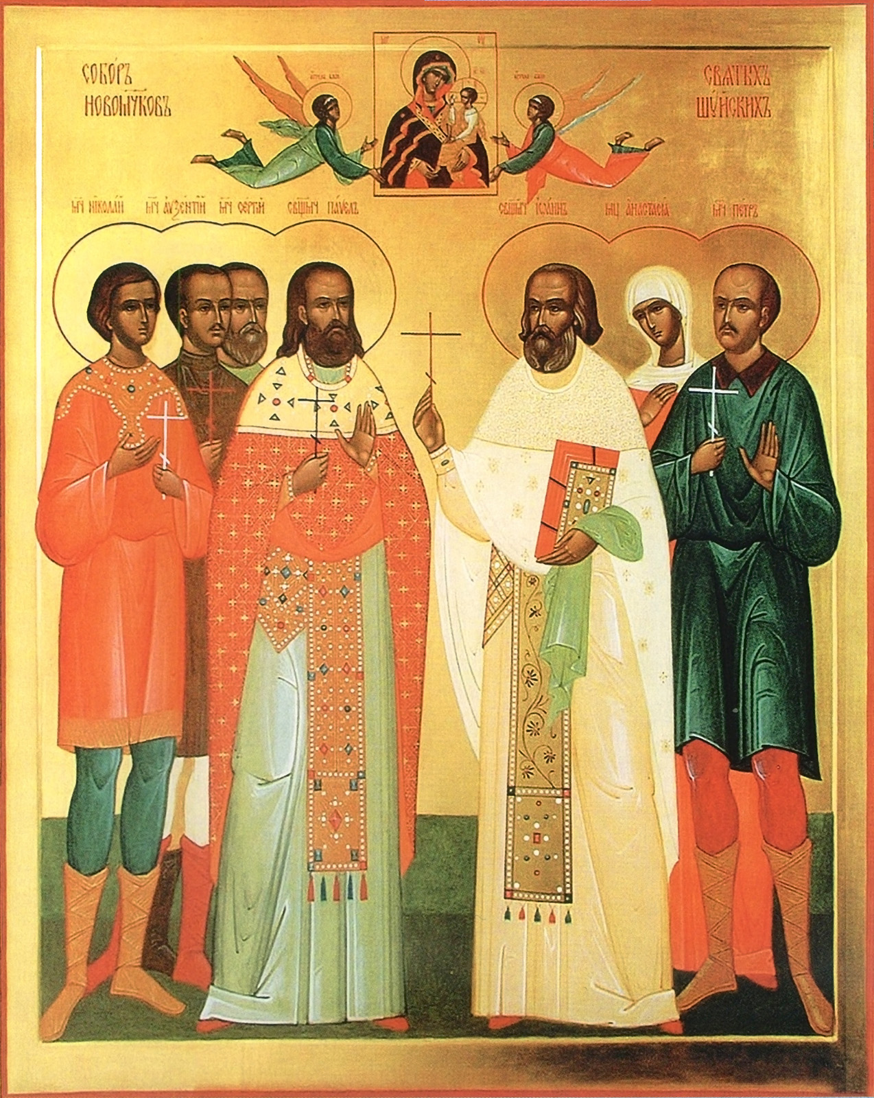 Икона Собор святых новомучеников Шуйских